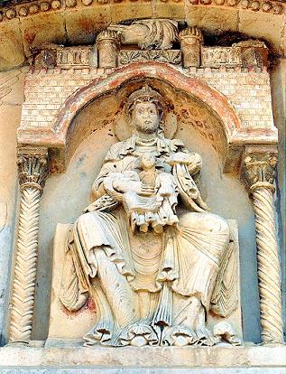 Notre-Dame-du-Pré (ancien prieuré clunisien de Donzy-le-Pré) tympan, la Vierge en Majesté